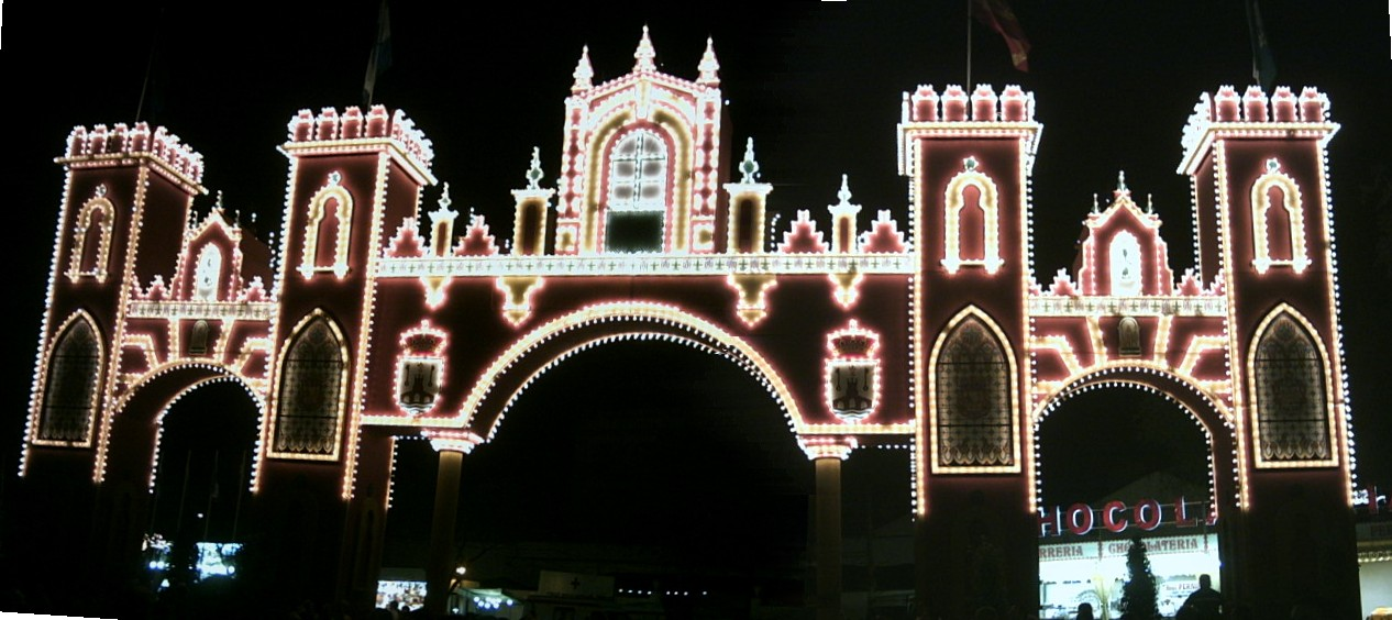 Portada de una de las ediciones de la feria de Alcalá.